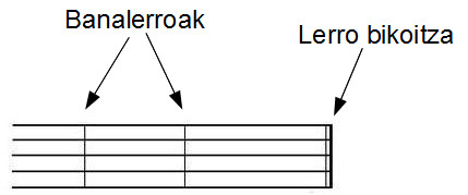 Banalerroak